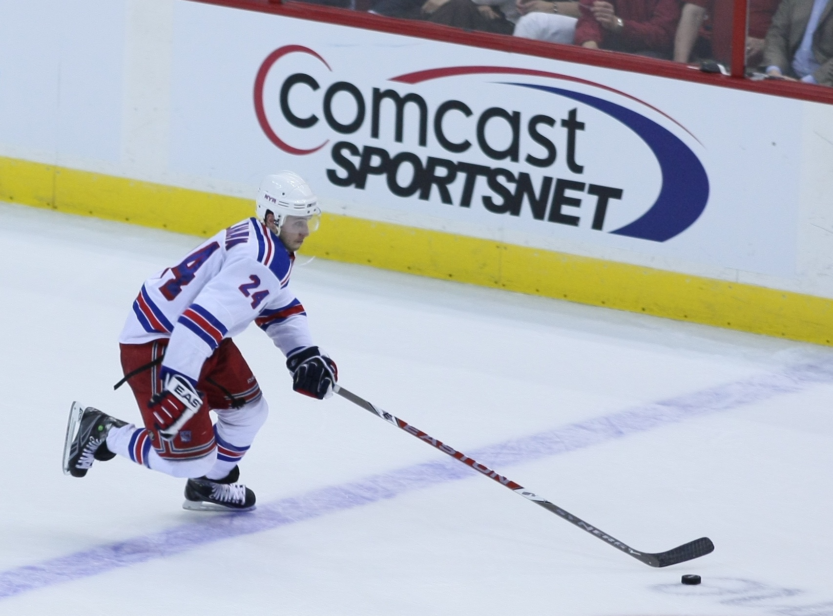 Ryan Callahan